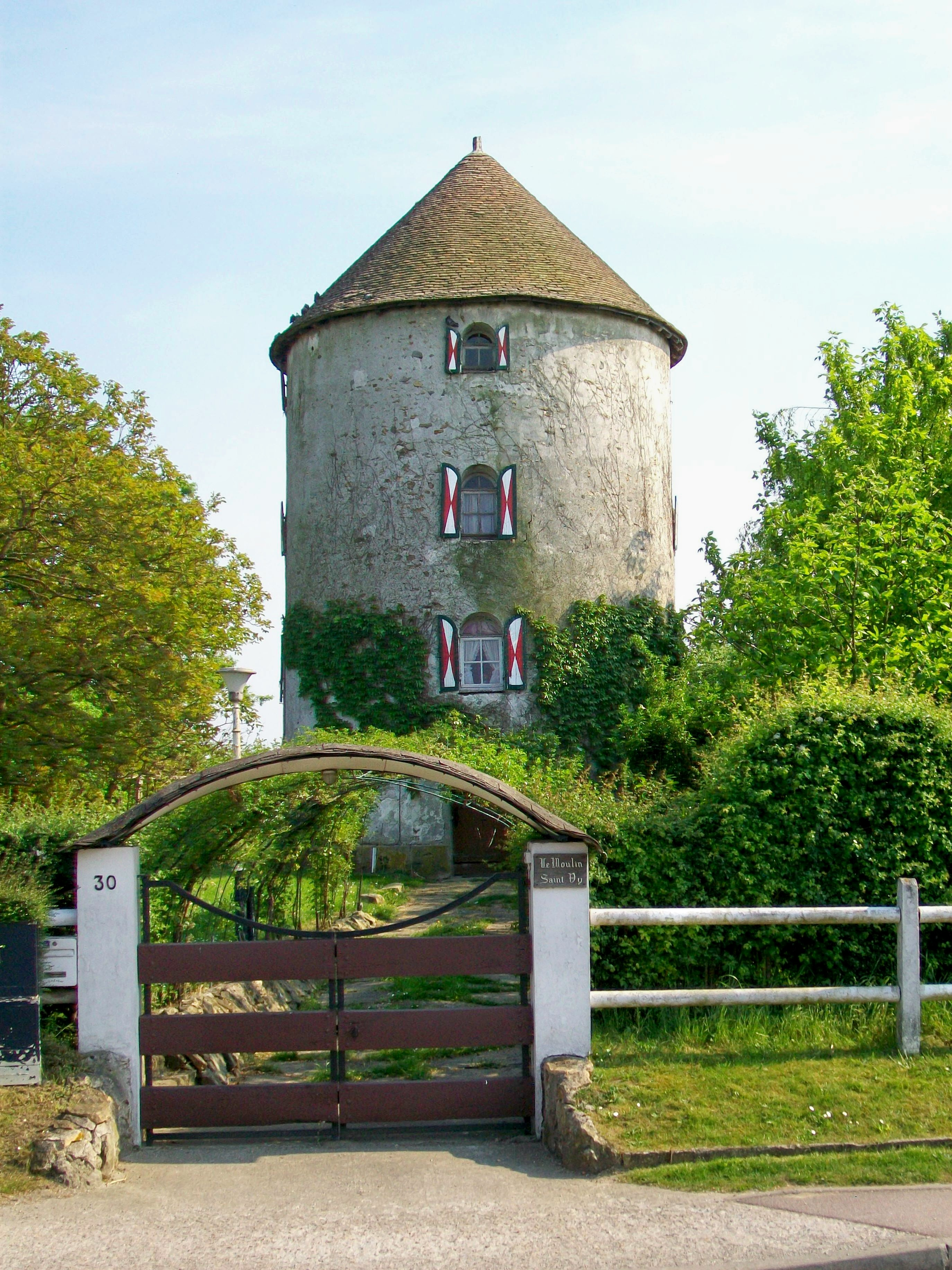 L'ancien moulin à vent au centre de Saint-Witz.